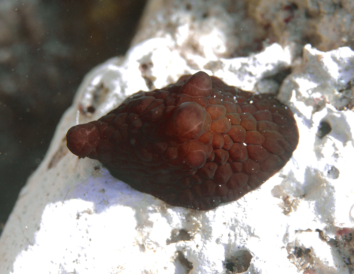 Un coquillage éponge (Coriocella nigra) à la Réunion.